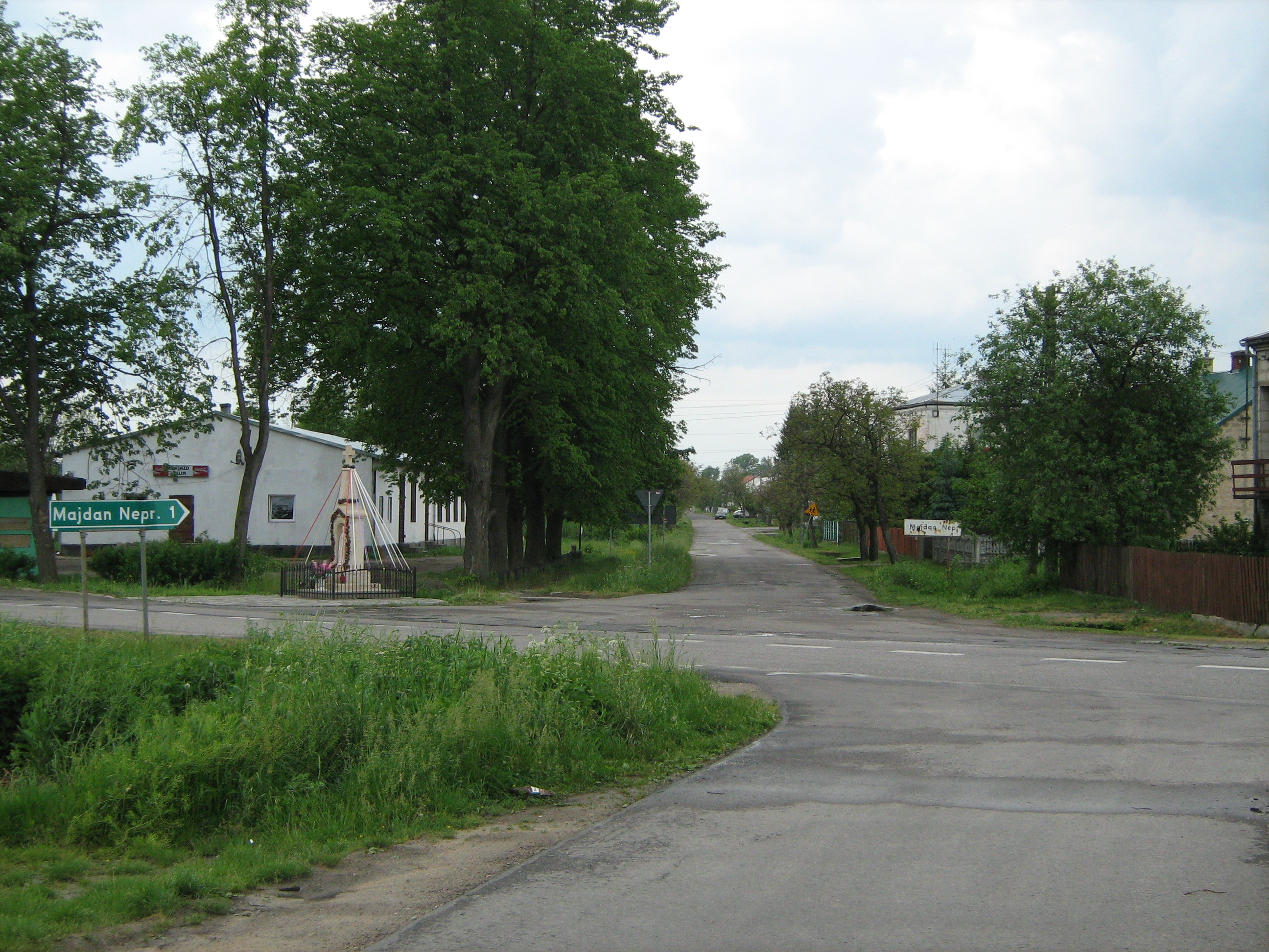 Majdan Nepryski (Polska). Autor: "Piott", Data wykonania zdjęcia: 27 maja 2007 r.